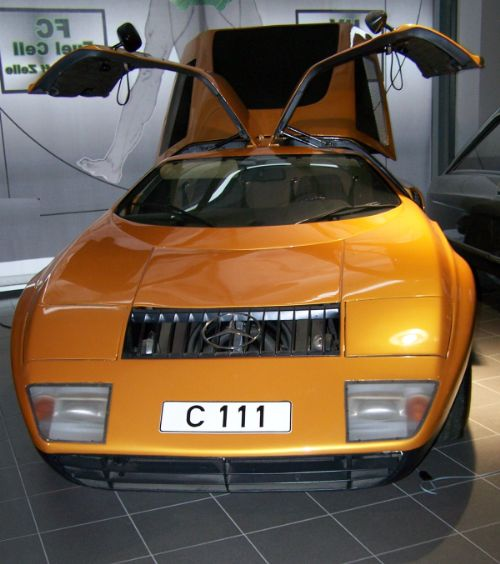 Mercedes-Benz C-111 Museum Autovision